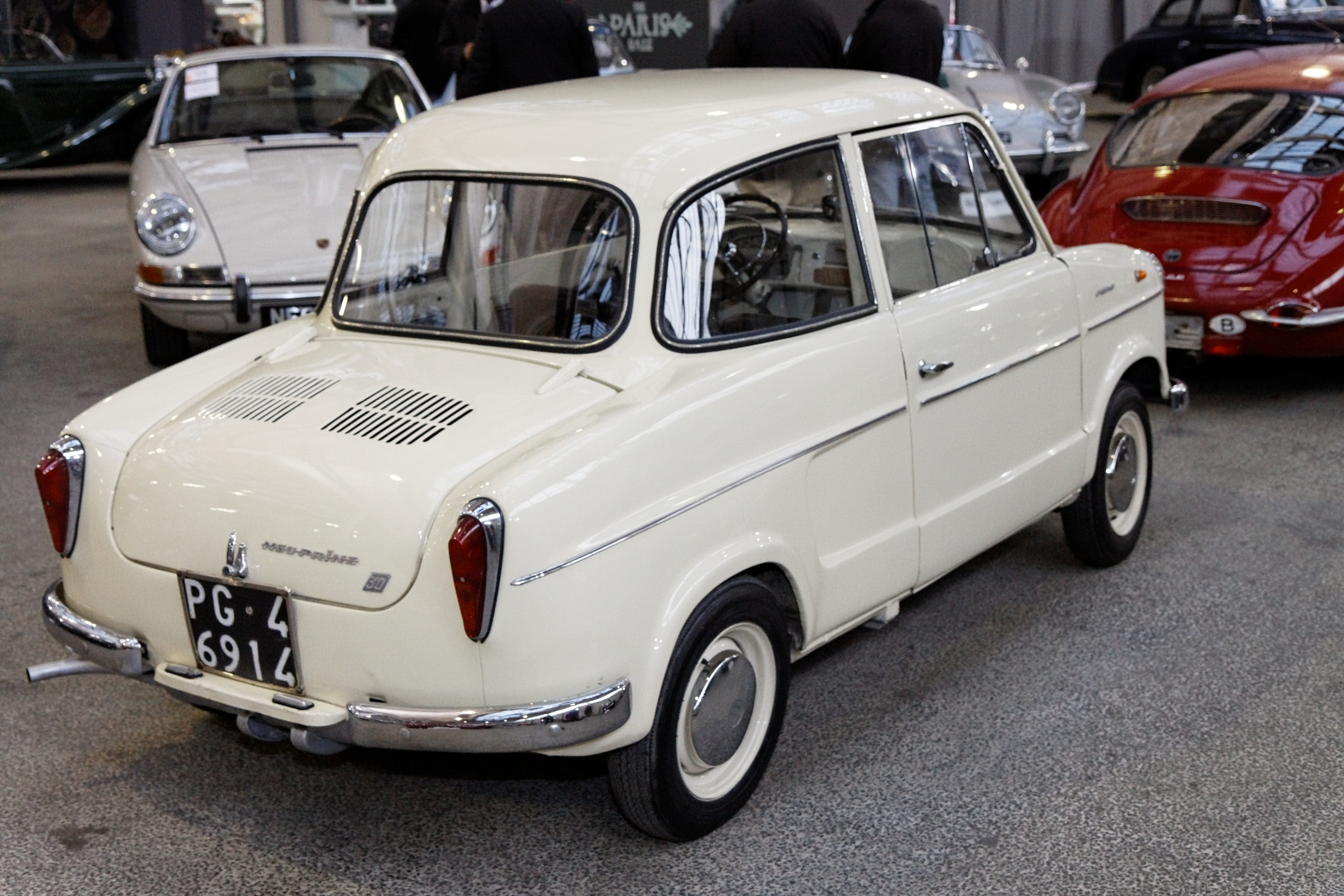 Alfa Romeo NSU Prinz 30 Saloon